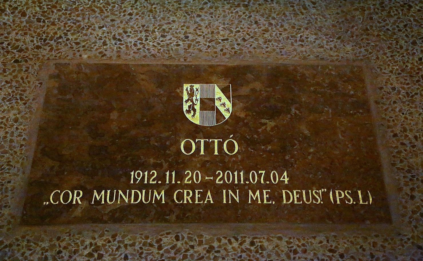 Pannonhalmi Bencés Főapátság, altemplom